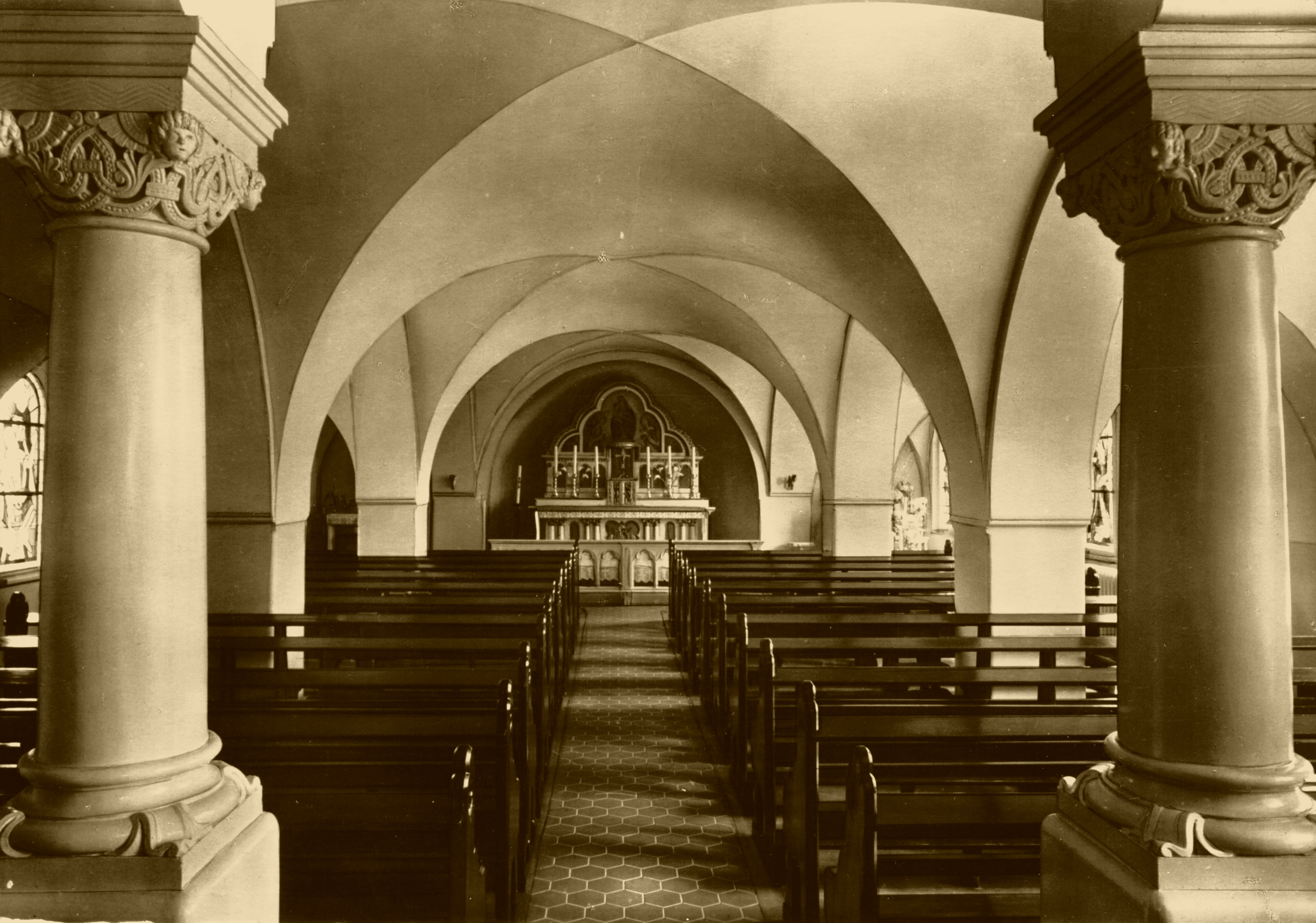 Kapelle des Marienstifts Magdeburg